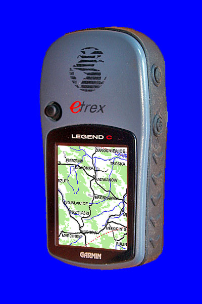 Garmin Legend C